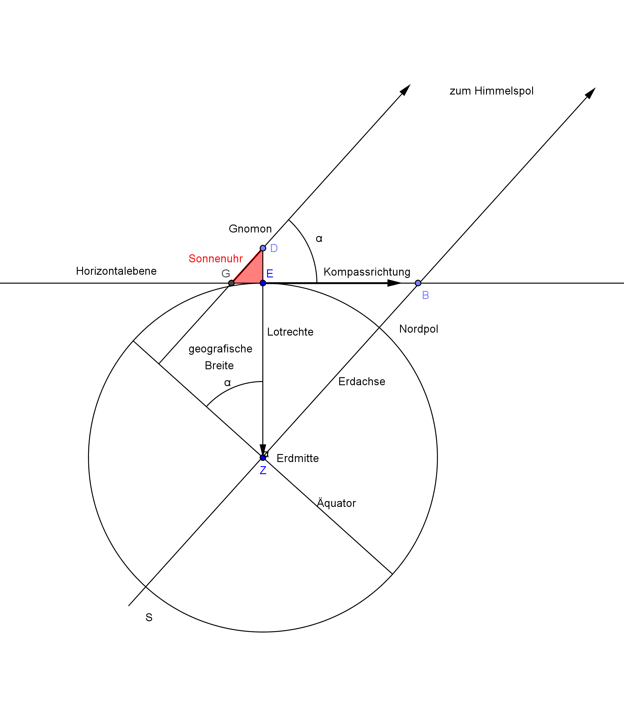 Um den schattenwerfenden Stab (Gnomon) einer Sonnenuhr parallel zur Erdachse ausrichten zu können, benötigt man die Kenntnis der geografischen Breite, der Nordrichtung und der Senkrechten am Ort der Aufstellung. Bei einer Klappsonnenuhr wird die Nordrichtung durch die Kompassnadel angezeigt, die Horizontale zur Errichtung des Winkels DGE, der genau der geografischen Breite entsprich, gewinnt man aus dem rechten Winkel auf die Richtung des Lots, das zum Erdmittelpunkt Z zeigt.